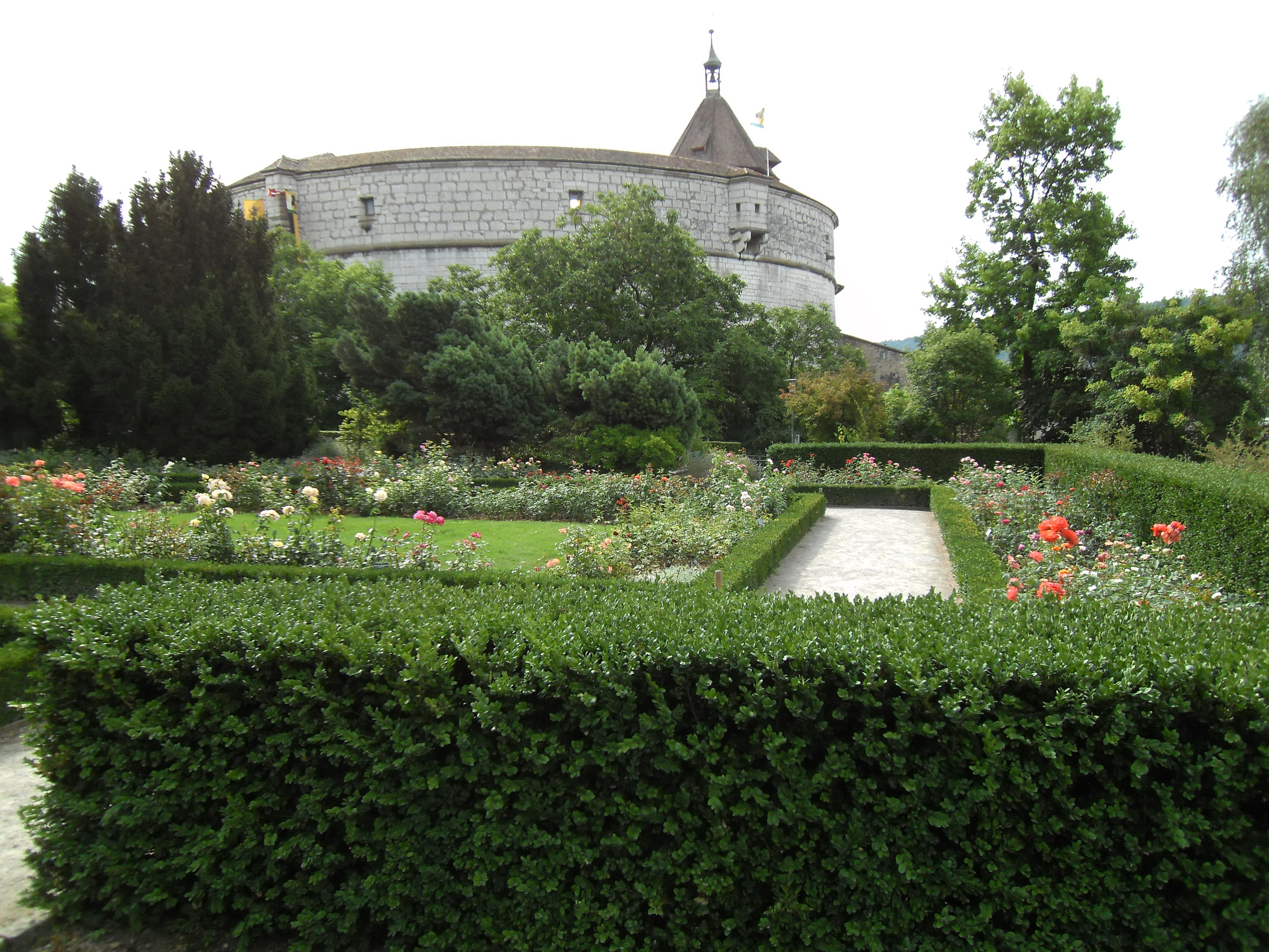 Munot Rosengarten1